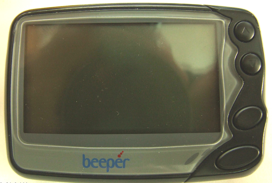 תצלום ביפר מדגם HORIZON של חברת ביפר בישראל